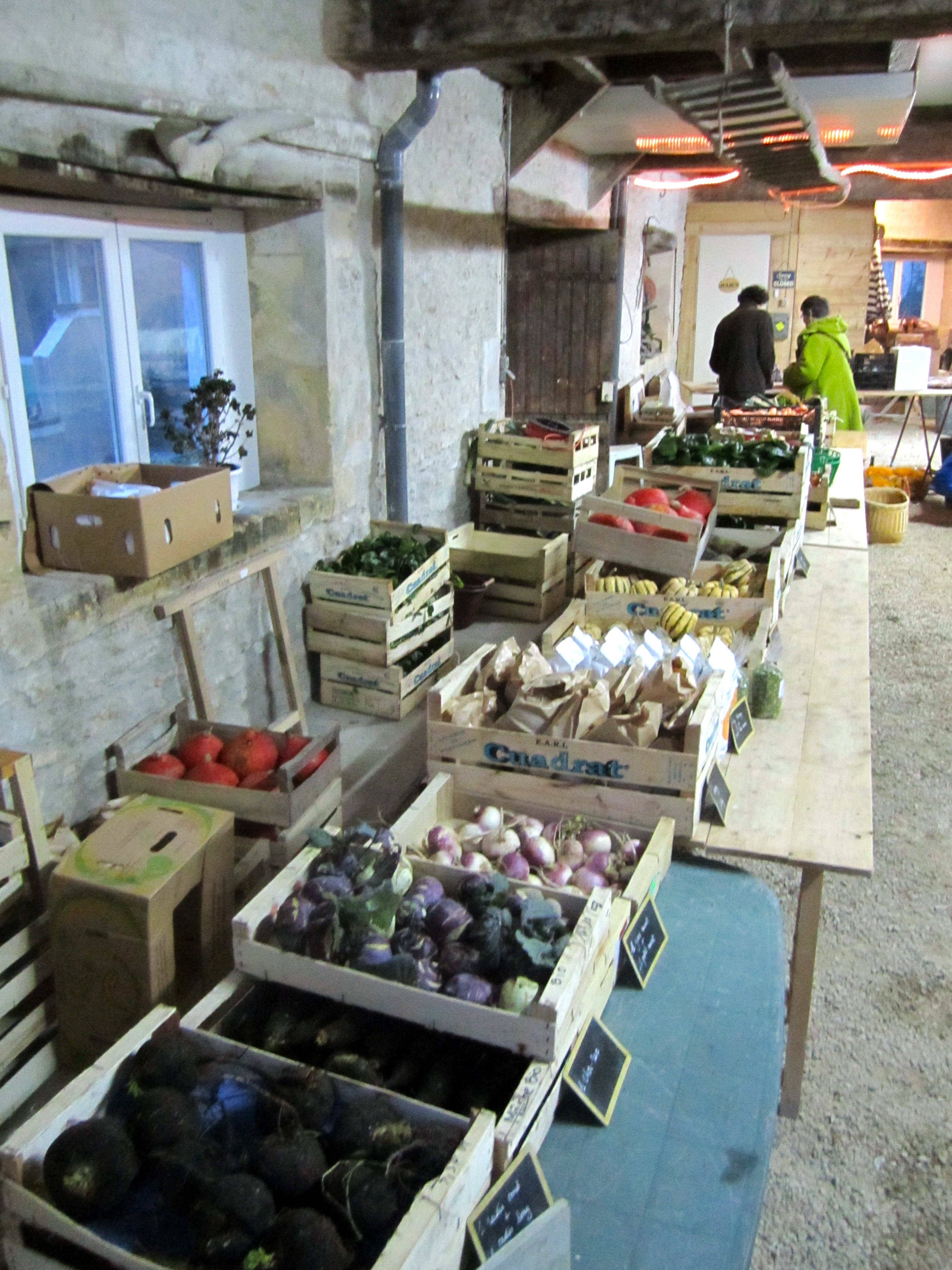 distribution de légumes dans une AMAP (Association de Maintien de l'Agriculture Paysanne)